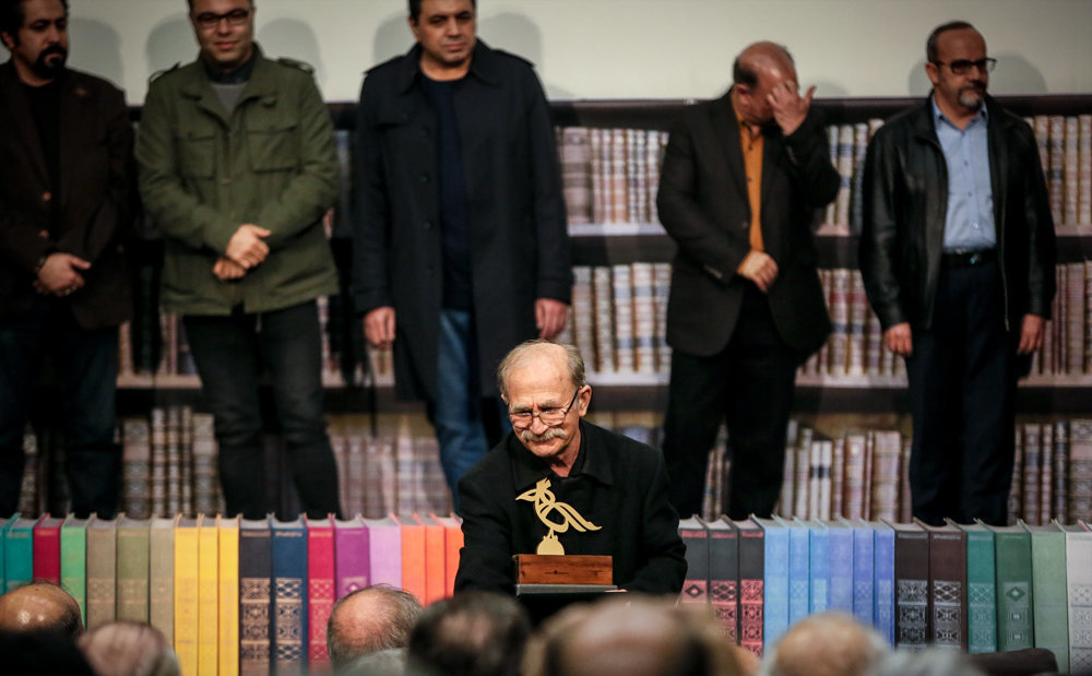 همایون امامی در هفتمین جشن کتاب سال سینما